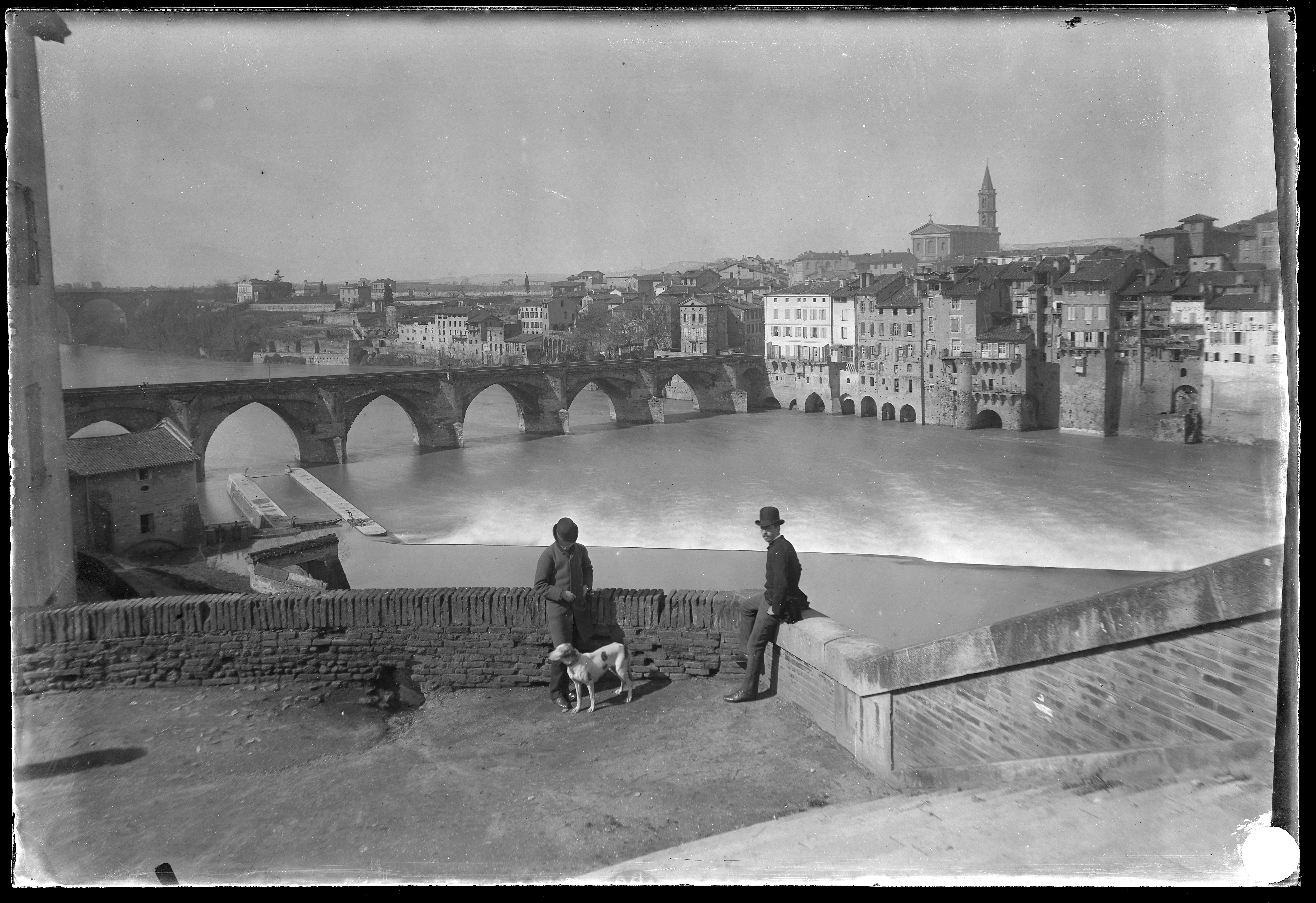 Inscription manuscrite sur l'enveloppe : " Albi : les quais et le faubourg "